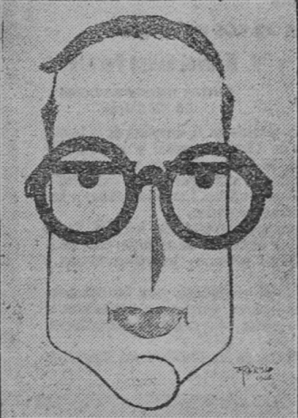 Julio Prieto Nespereira, caricatura en La Zarpa 1927